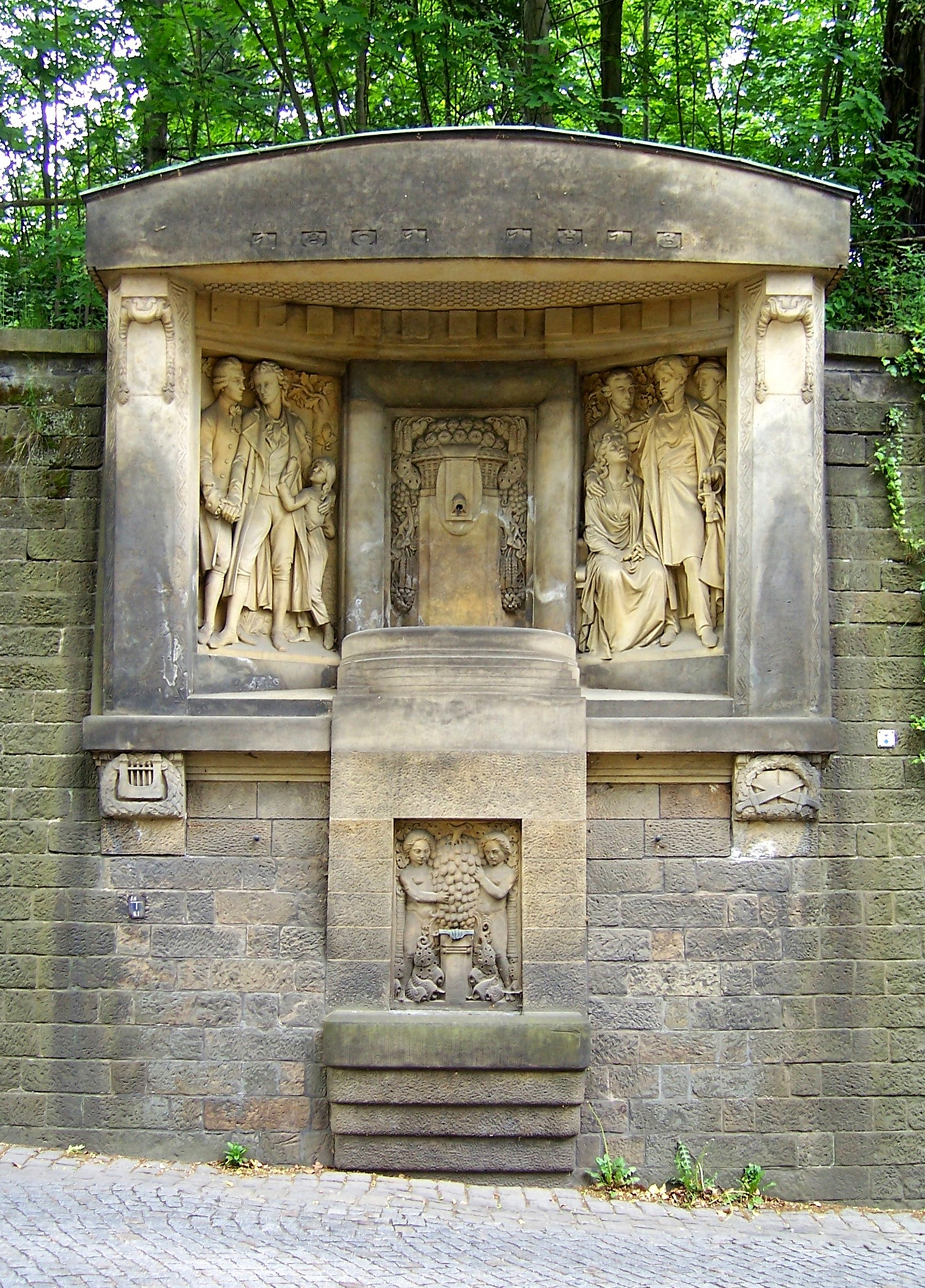 Das Schiller-Körner-Denkmal (auch Schiller-Körner-Brunnen) gegenüber dem Schillerhäuschen in Dresden-Loschwitz, errichtet 1912. Dargestellt sind die Auffenthalte Schillers im Hause Körner 1785/87 und 1801 (links) sowie Theodor Körners Abschied von den Eltern (rechts). Architekt: Martin Pietzsch. Bildhauer: Oskar Rassau.